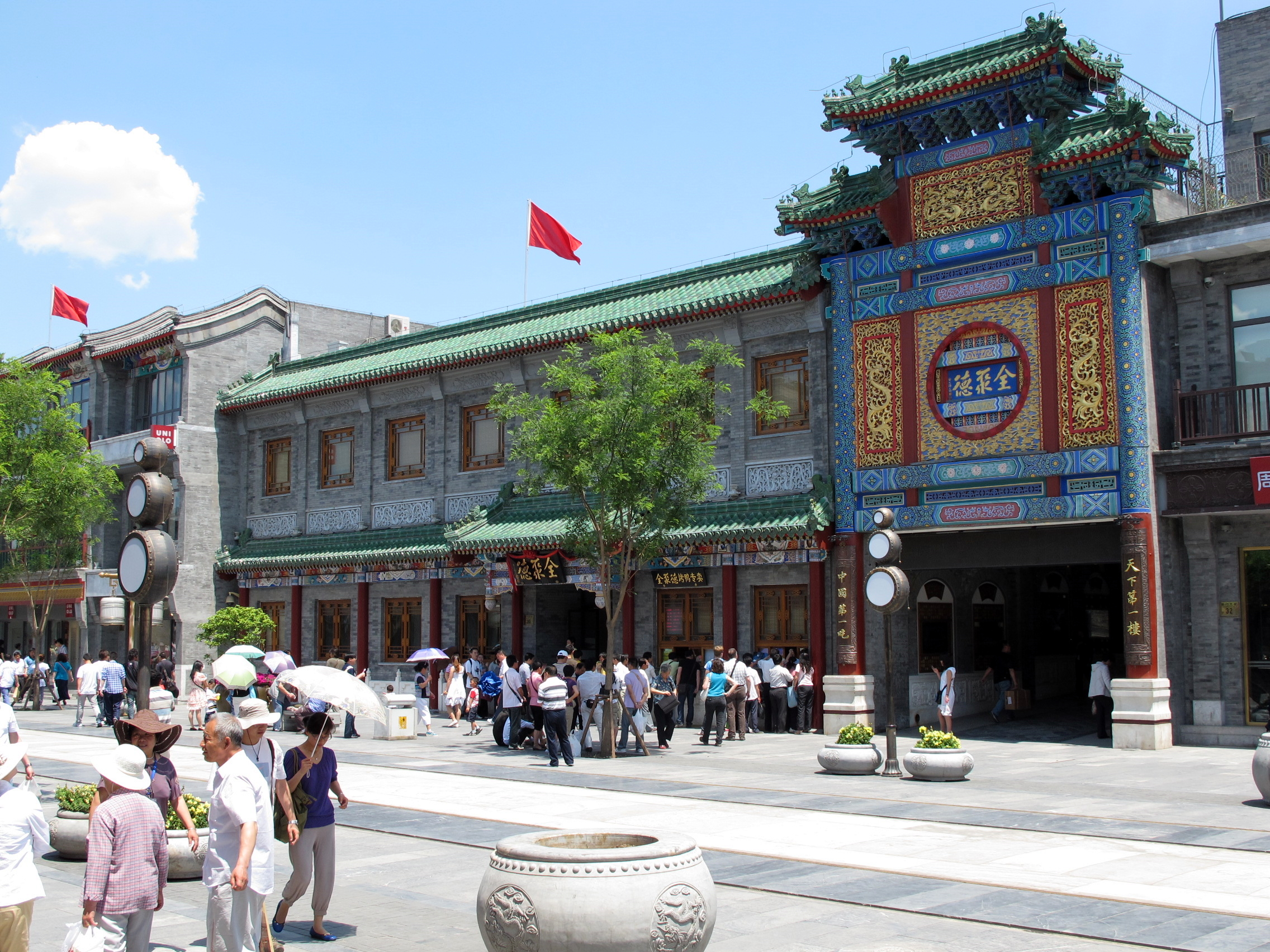 Quanjude Qianmen Dajie Store 全聚德於前門大街